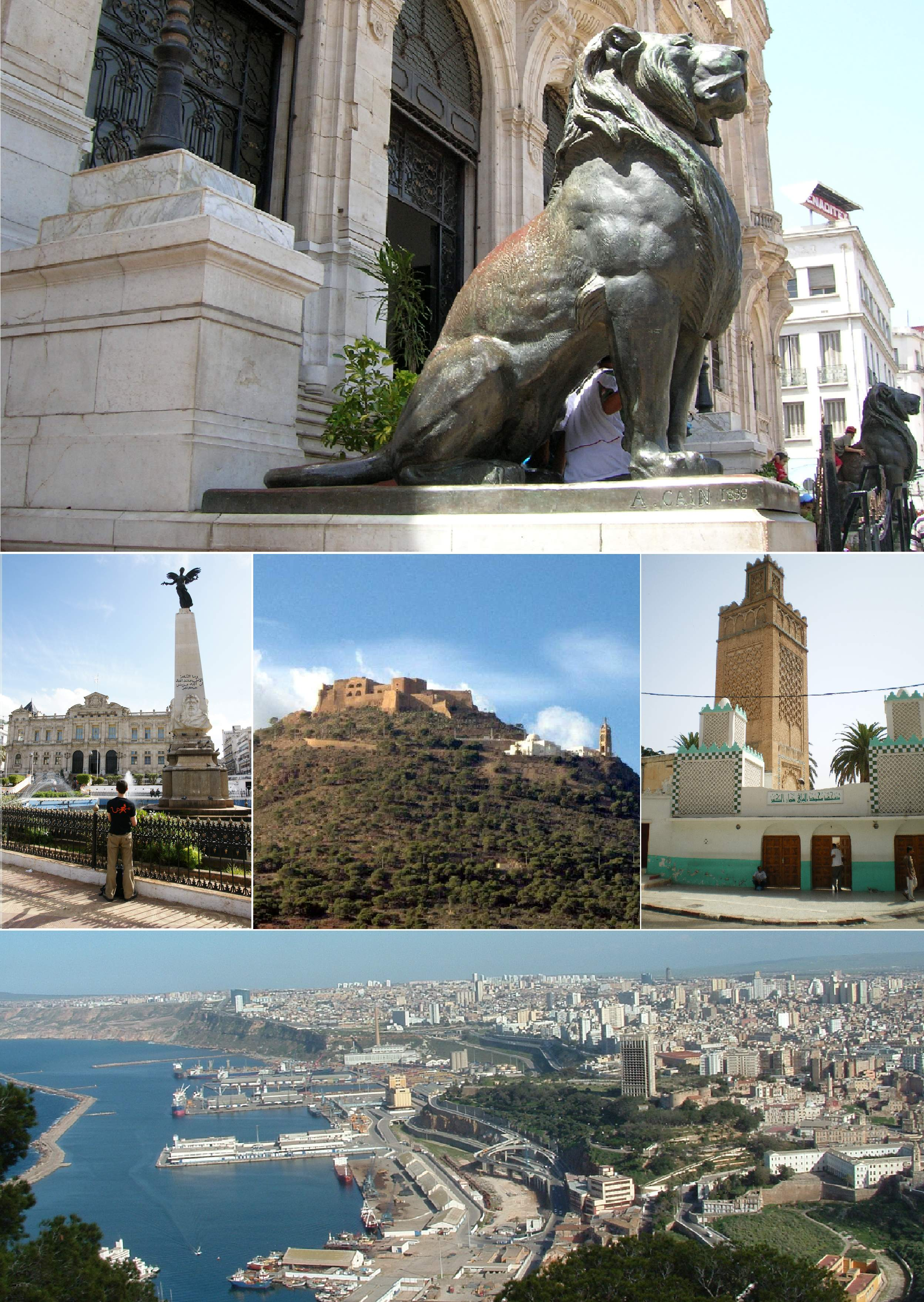 Les deux lions, Place 1er Novembre, Fort et Chapelle de Santa Cruz, Mosquée Bey Othmane, Vue générale